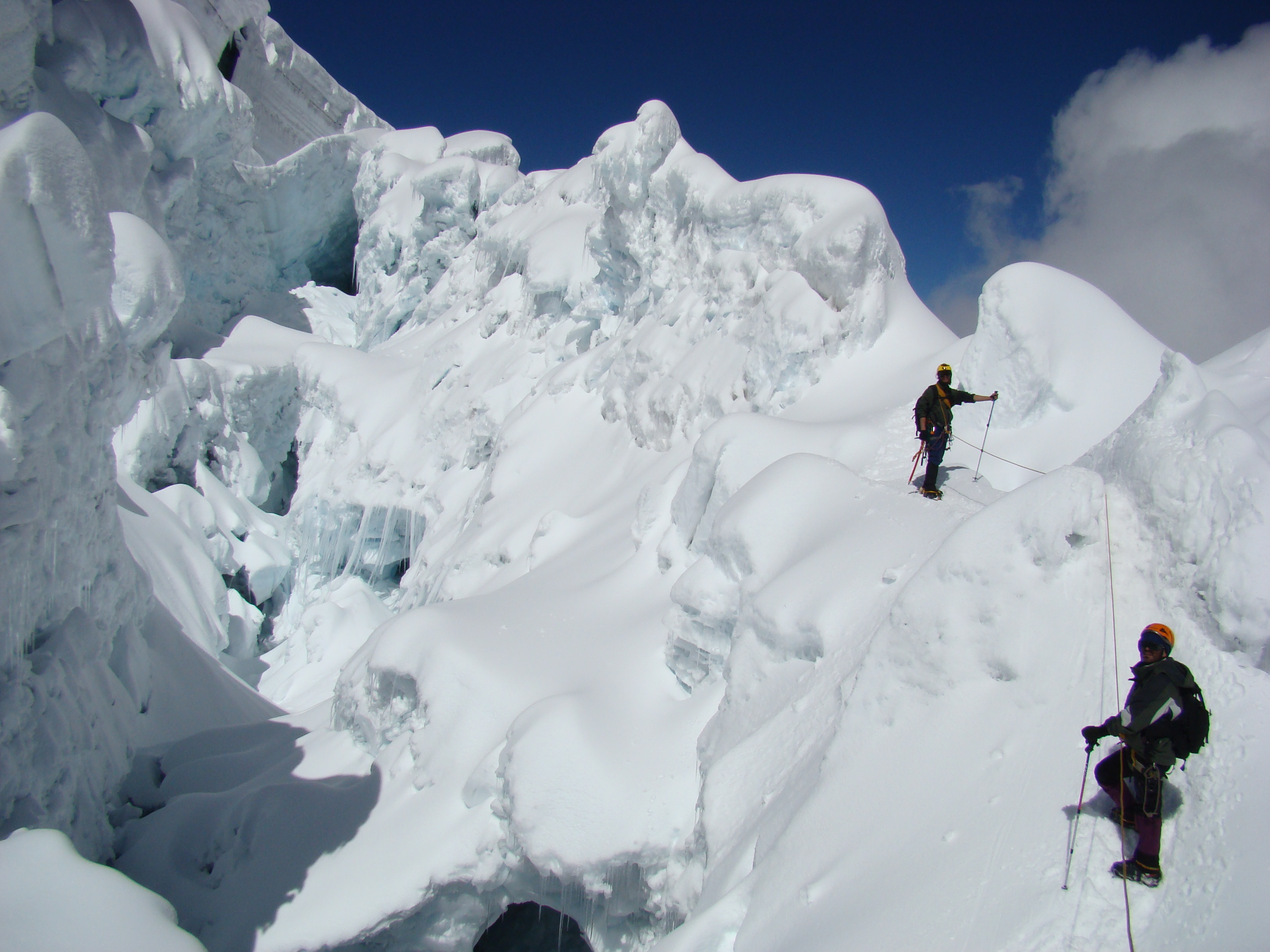 Querung des zentralen Serac- und Spaltengebietes auf 5.450m Höhe